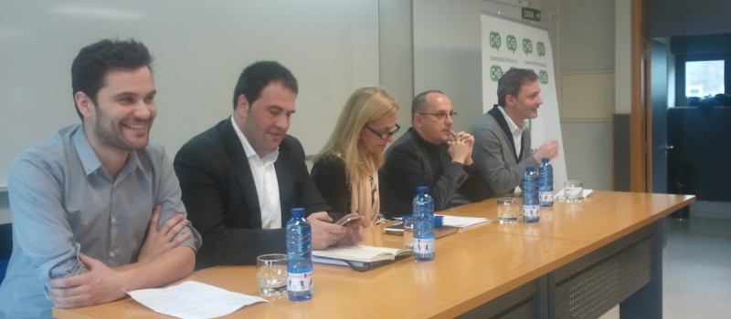 Charla de Jon Iñarritu (segundo pola esquerda), Carles Campuzano (segundo pola dereita) e Xoán Bascuas (primeiro pola dereita) en Compostela no 2013.